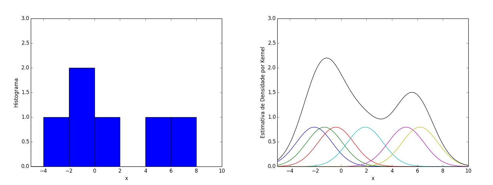 Comparação de um histograma (a esquerda) e uma estimativa de densidade por kernel (a direita) construídos usando os mesmos dados [-2.1, -1.3, -0.4, 1.9, 5.1, 6.2]. O Histograma foi criado usando o intervalo [-6,9] dividido em caixas de tamanho 2. Enquanto que a estimativa foi feita centrando 6 kernels gaussianos de desvio padrão 2.5 e com média nas abscissas descritas pelos dados. A curva suave em preto demonstra a estimativa de densidade, enquanto que as outras curvas demonstram os 6 kernels de densidade, a primeira foi escalonada por um fator de 30 enquanto os kernels foram escalonados por um fator de 5 para efeito visual.